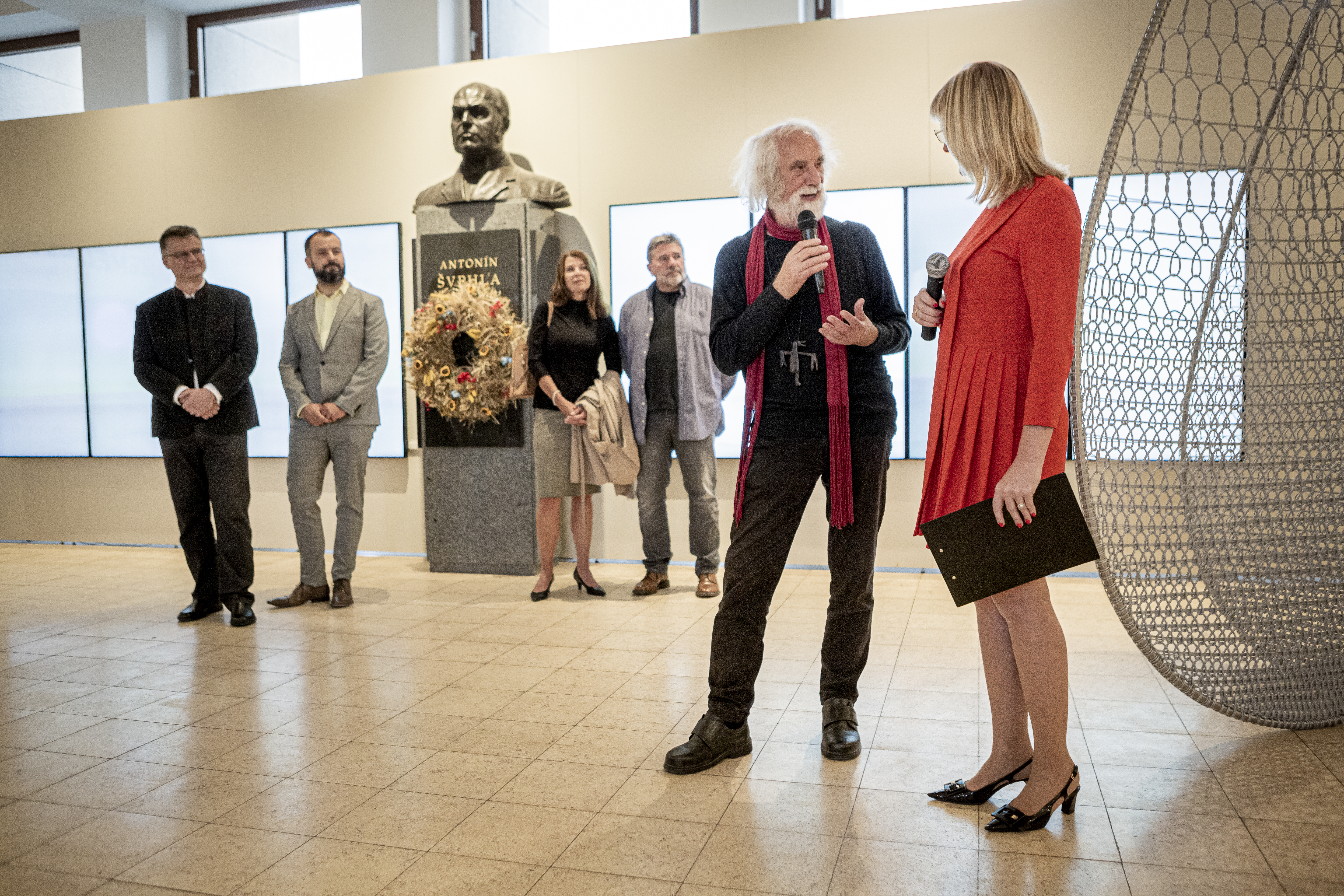 Dva fotografické cykly Jindřicha Štreita zachycující české zemědělství v 80. letech 20. století a v roce 2018, doplněné o exponáty věnované cyklům lidského života, základní cykly energie, hmoty a života. Národní zemědělské muzeum Praha. Termín konání: 20. 9. 2019 – 31. 7. 2020